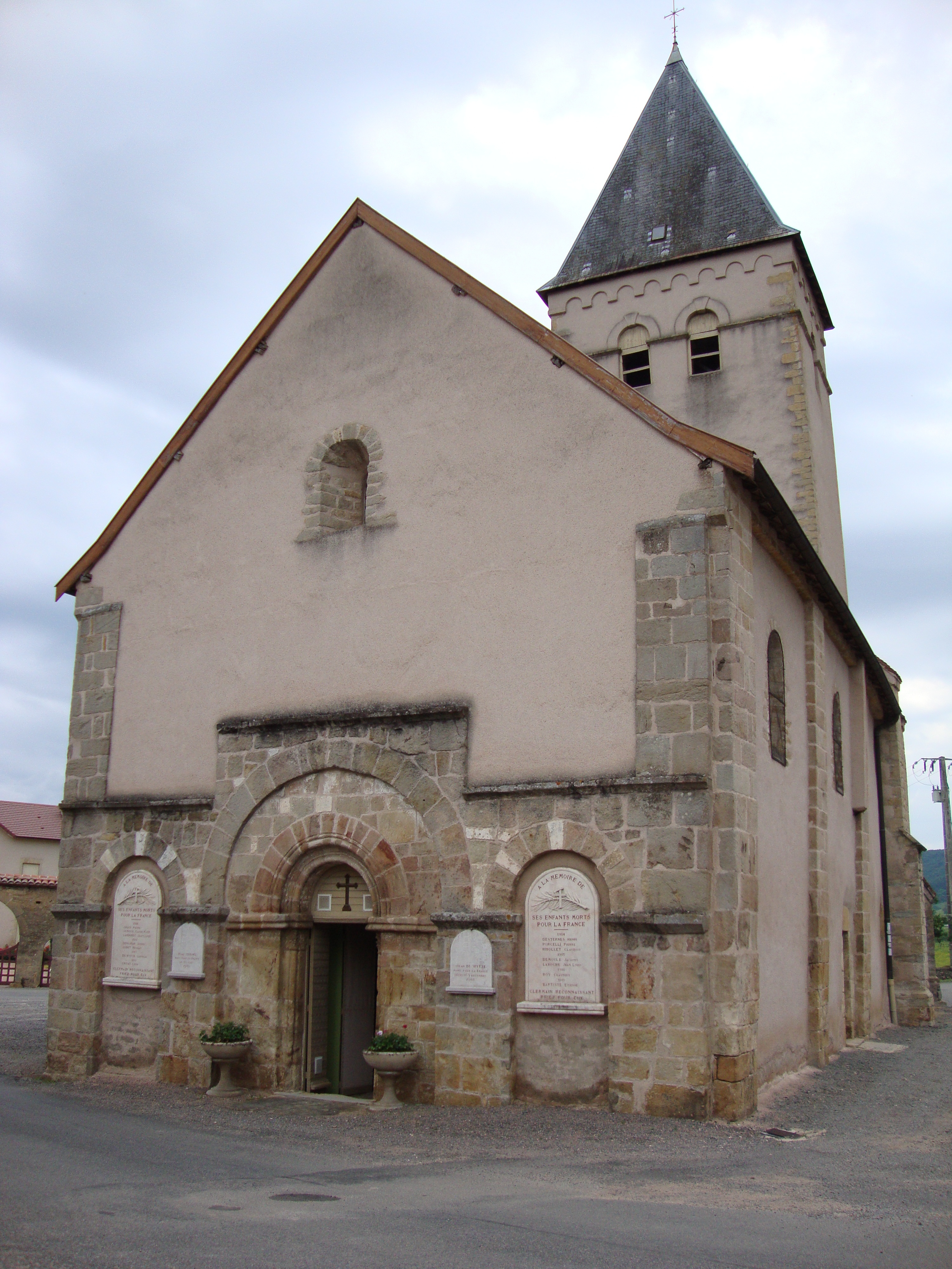 Clermain (Saône-et-Loire) église, monument aux morts.